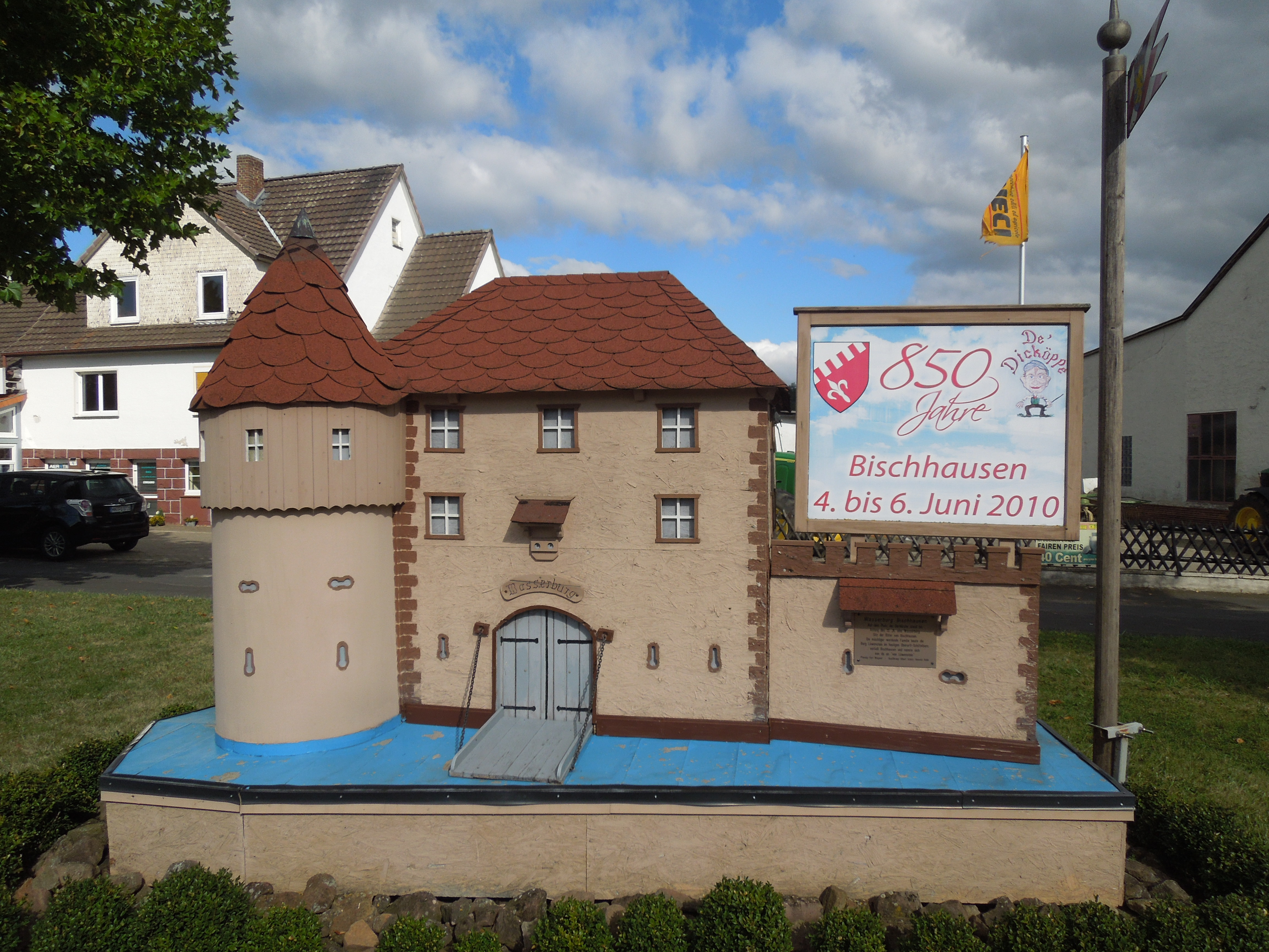 Bischhausen, phantasievolles Modell der verschwundenen Burg Bischhausen